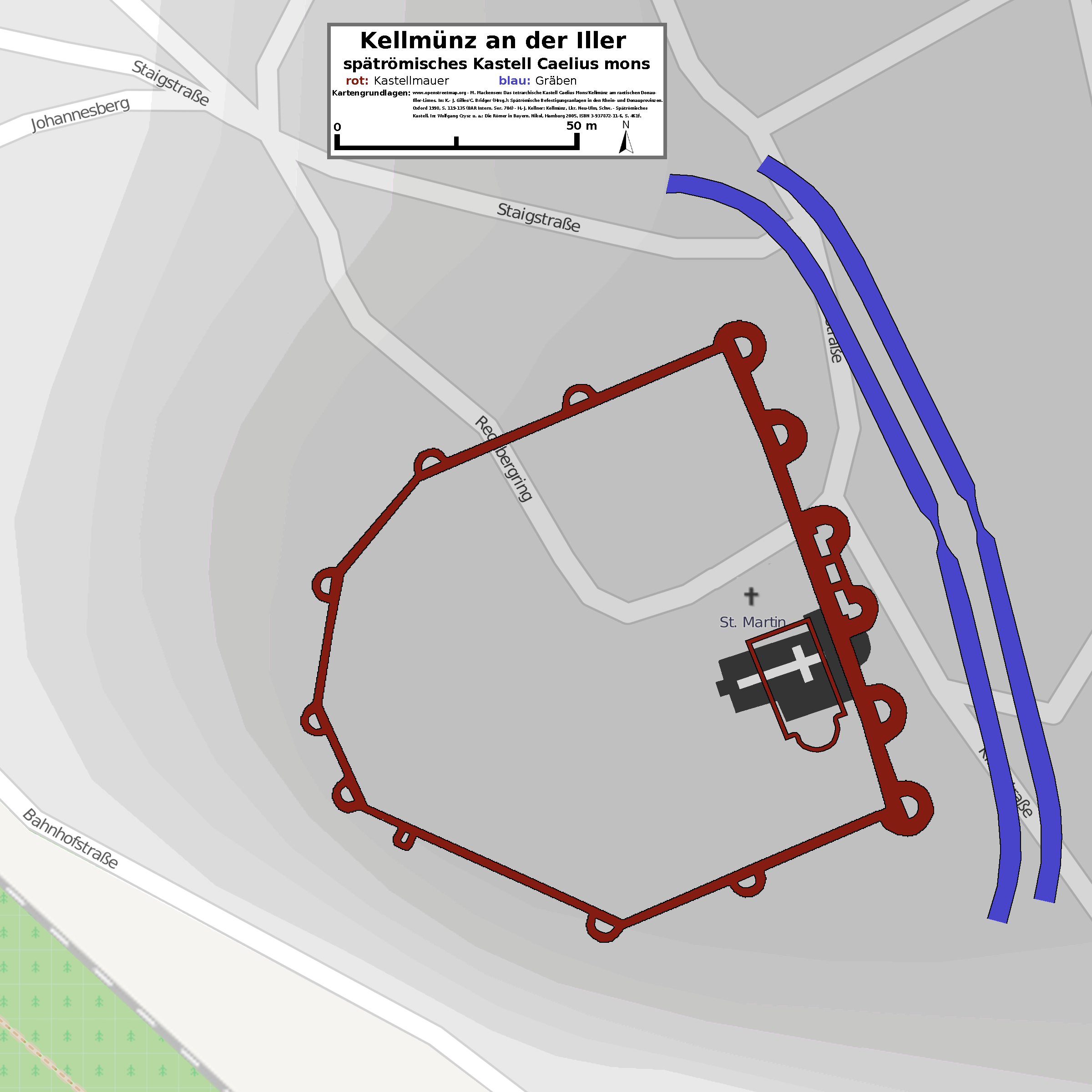 Lageplan des spätrömischen Kastell Kellmünz.